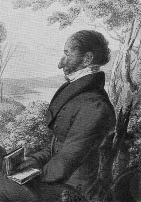 Kašpar Šternberk